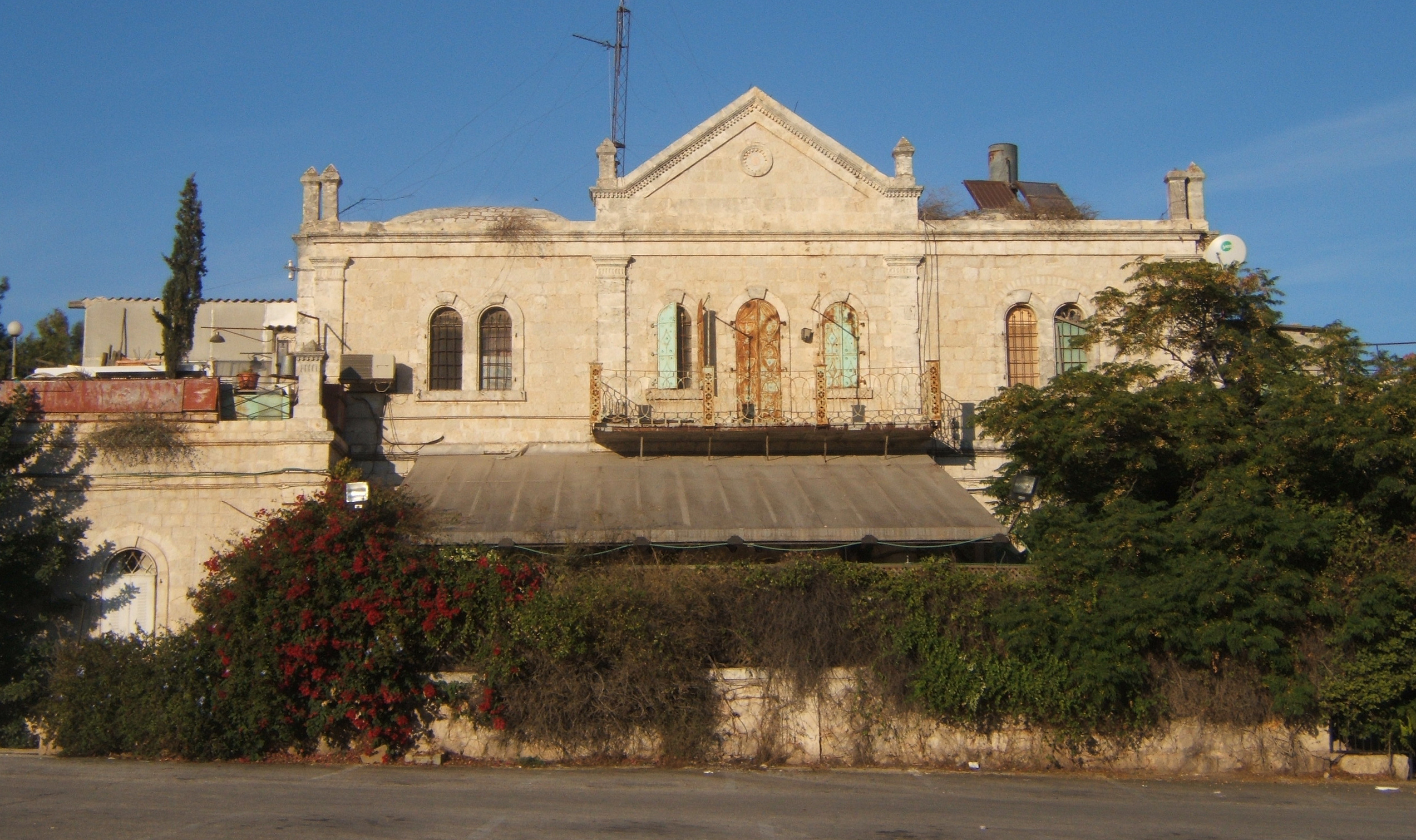 First Mahanaim House, Jerusalem